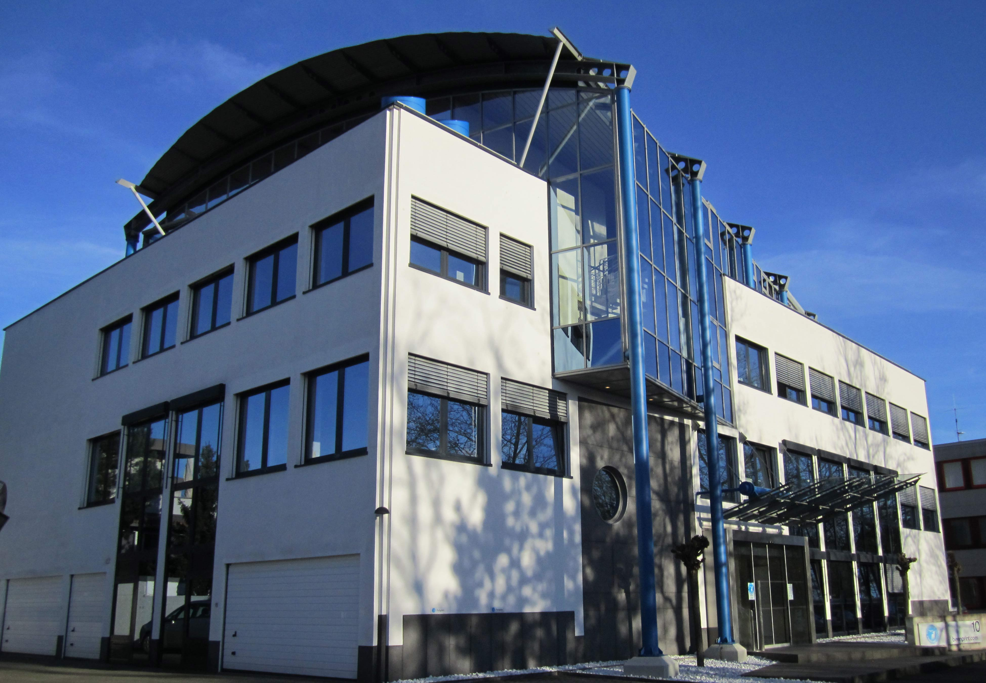 Das Bild zeigt die Bundesgeschäftsstelle des Deutschen Tierschutzbundes, In der Raste 10, Bonn.